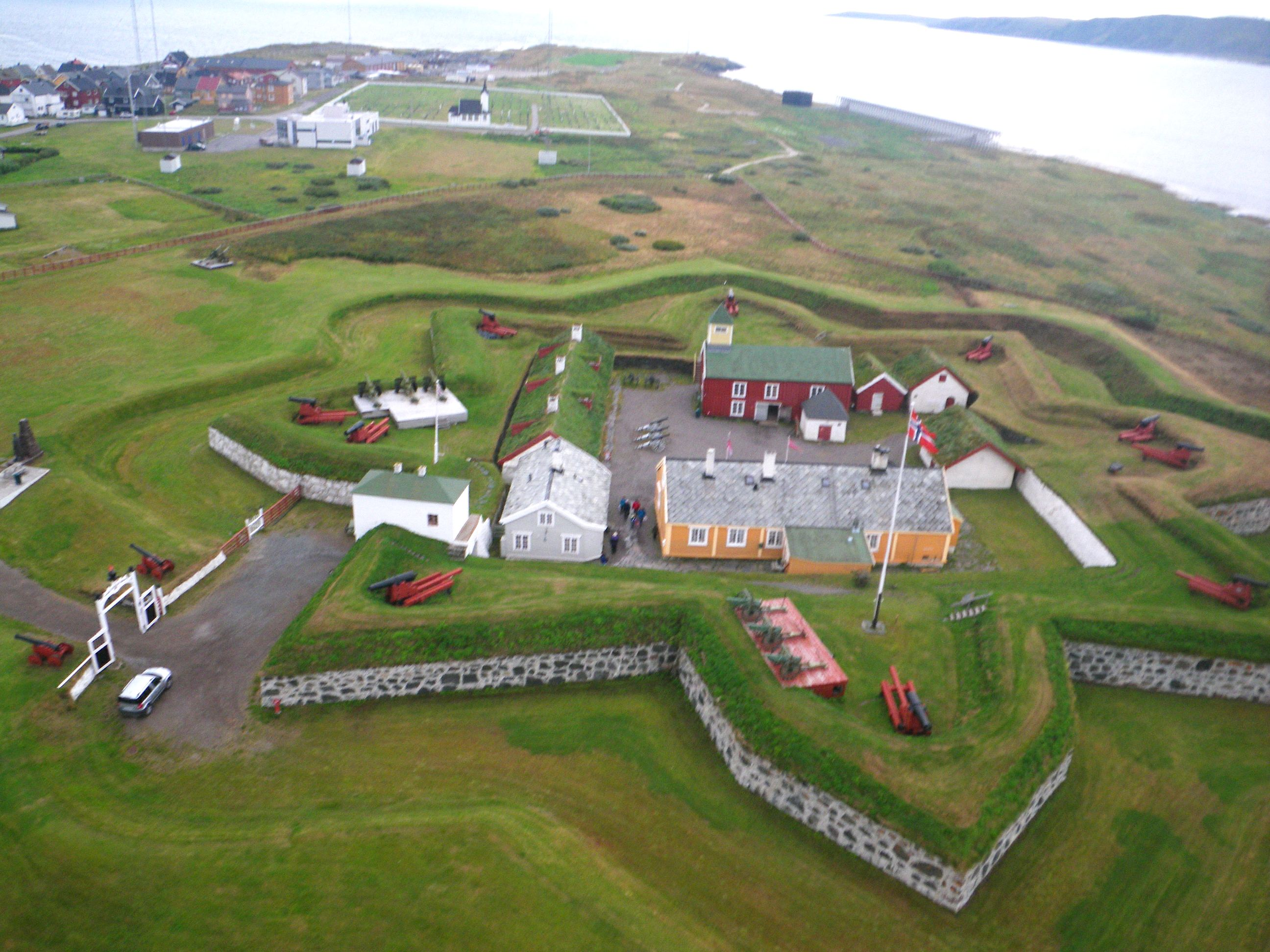 Vardøhus fortress in the town of Vardø seen from air. Norway's easternmost and northernmost fortress